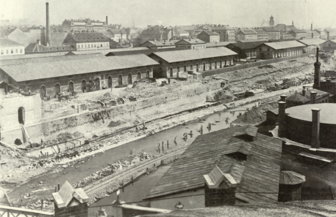 Wienflußregulierung bei der Gaudenzdorfer Gasanstalt, 1894-98, Bezirksmuseum Meidling